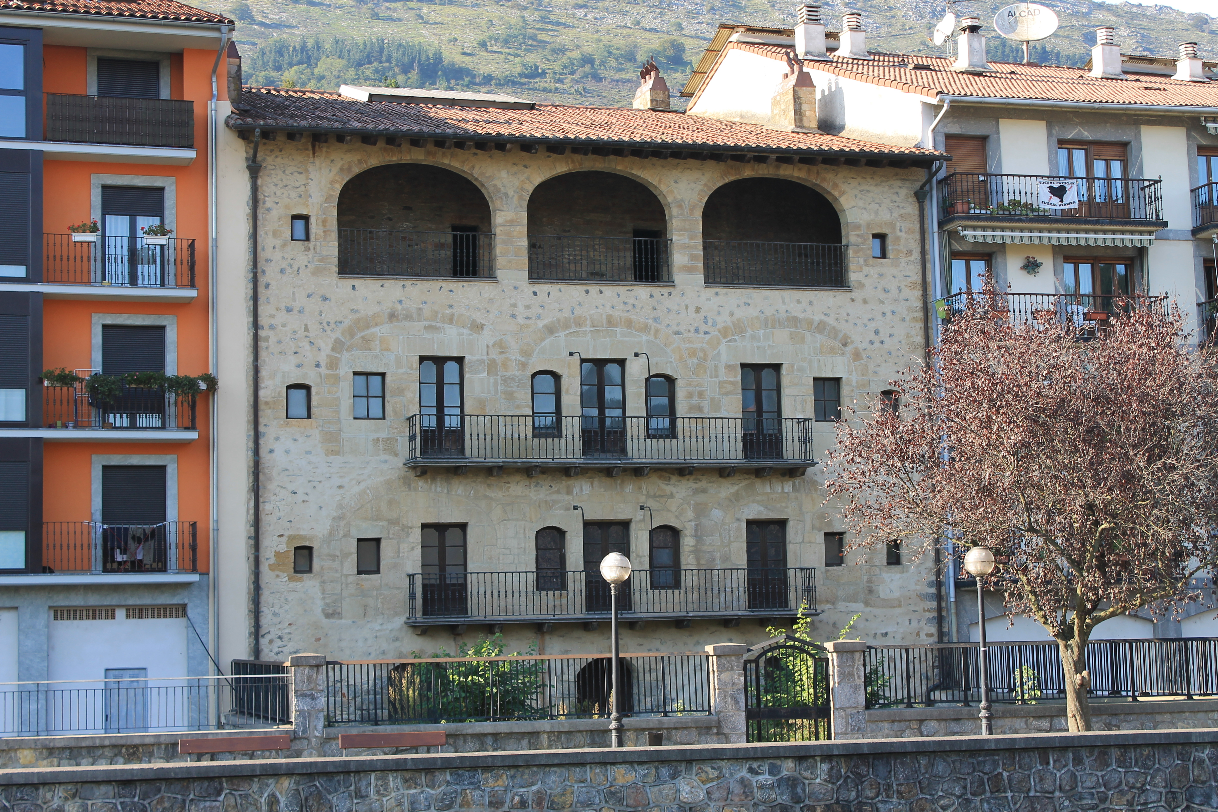 Es la construccion civil ma´s antigua del pueblo de Azpeitia. Edificio del siglo XIV-XV. Fachada principal, con vistas al rio Urola.